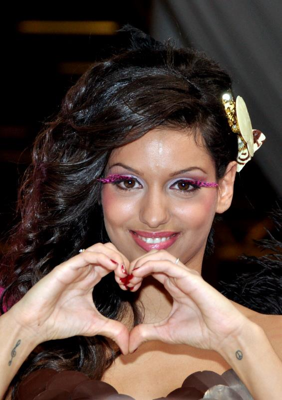 Tal au défilé de mode du salon du chocolat